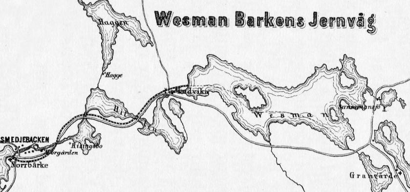 Wesman Barkens Jernväg